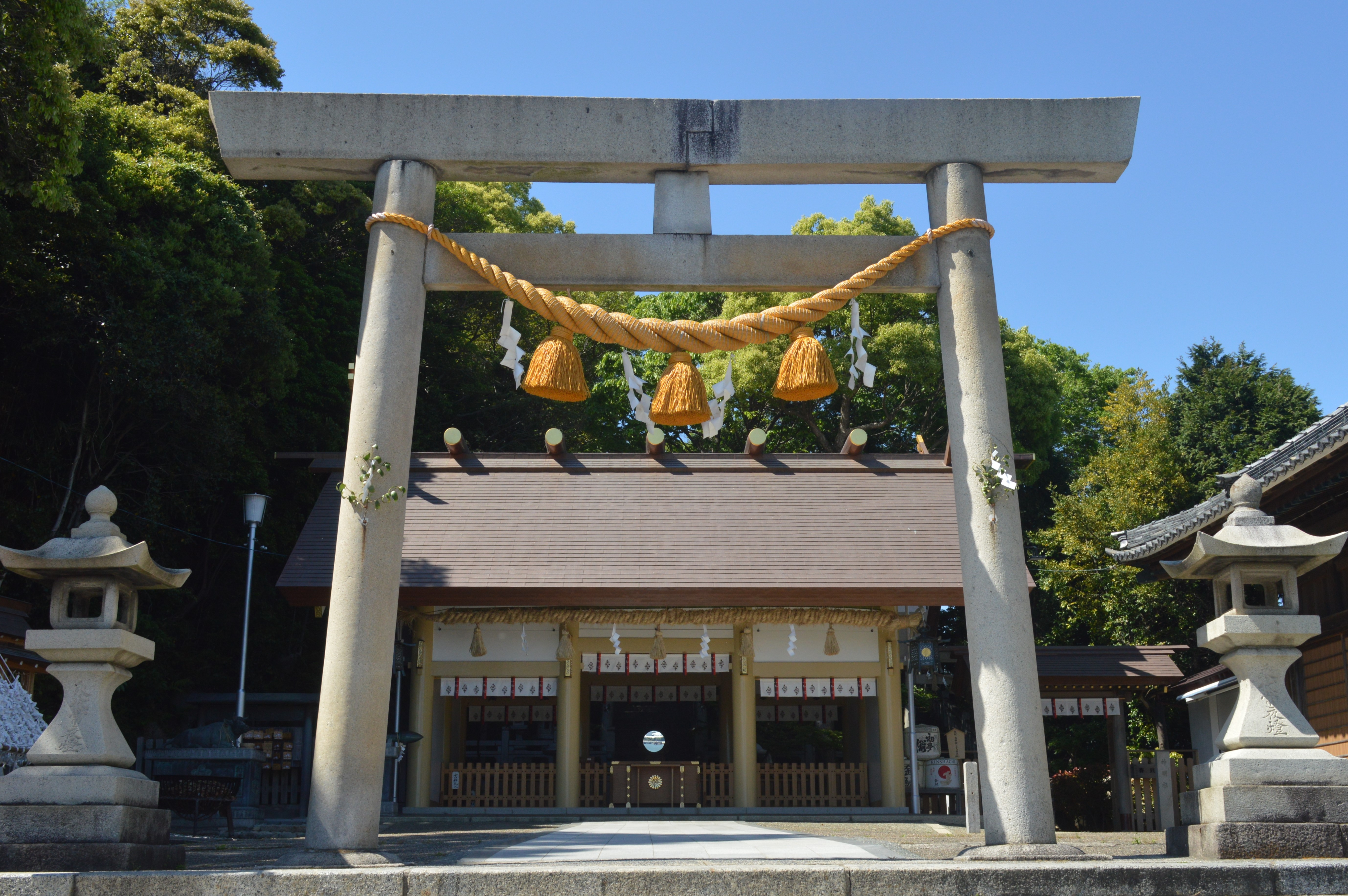 愛知県半田市亀崎町2丁目92にある神前神社。